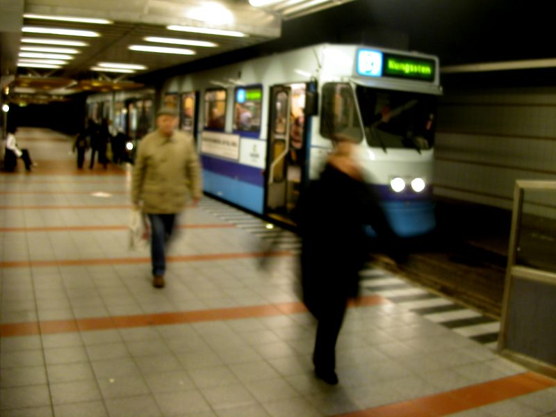 En spårvagn på linje 9 ankommer till den underjordiska spårvagnsstationen i Hammarkullen, Göteborg